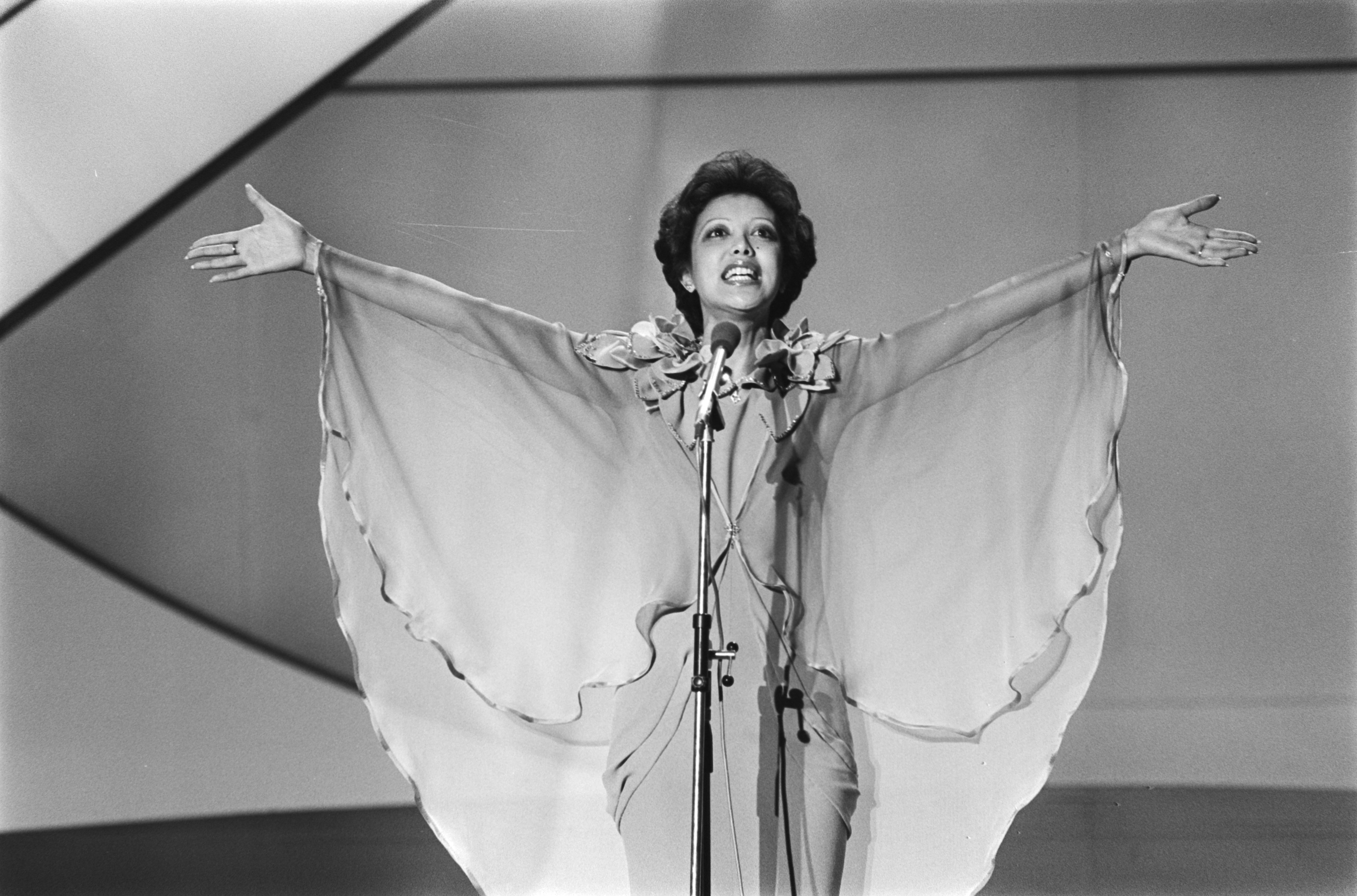 Collectie / Archief : Fotocollectie Anefo Reportage / Serie : [ onbekend ] Beschrijving : Eurovisie Songfestival 76 Den Haag ; Sandra (Nederland) Datum : 3 april 1976 Locatie : Den Haag, Nederland Trefwoorden : songfestivals Persoonsnaam : Eurovisie Songfestival Instellingsnaam : Nederland Fotograaf : Mieremet, Rob / Anefo Auteursrechthebbende : Nationaal Archief Materiaalsoort : Negatief (zwart/wit) Nummer archiefinventaris : bekijk toegang 2.24.01.05 Bestanddeelnummer : 928-5022